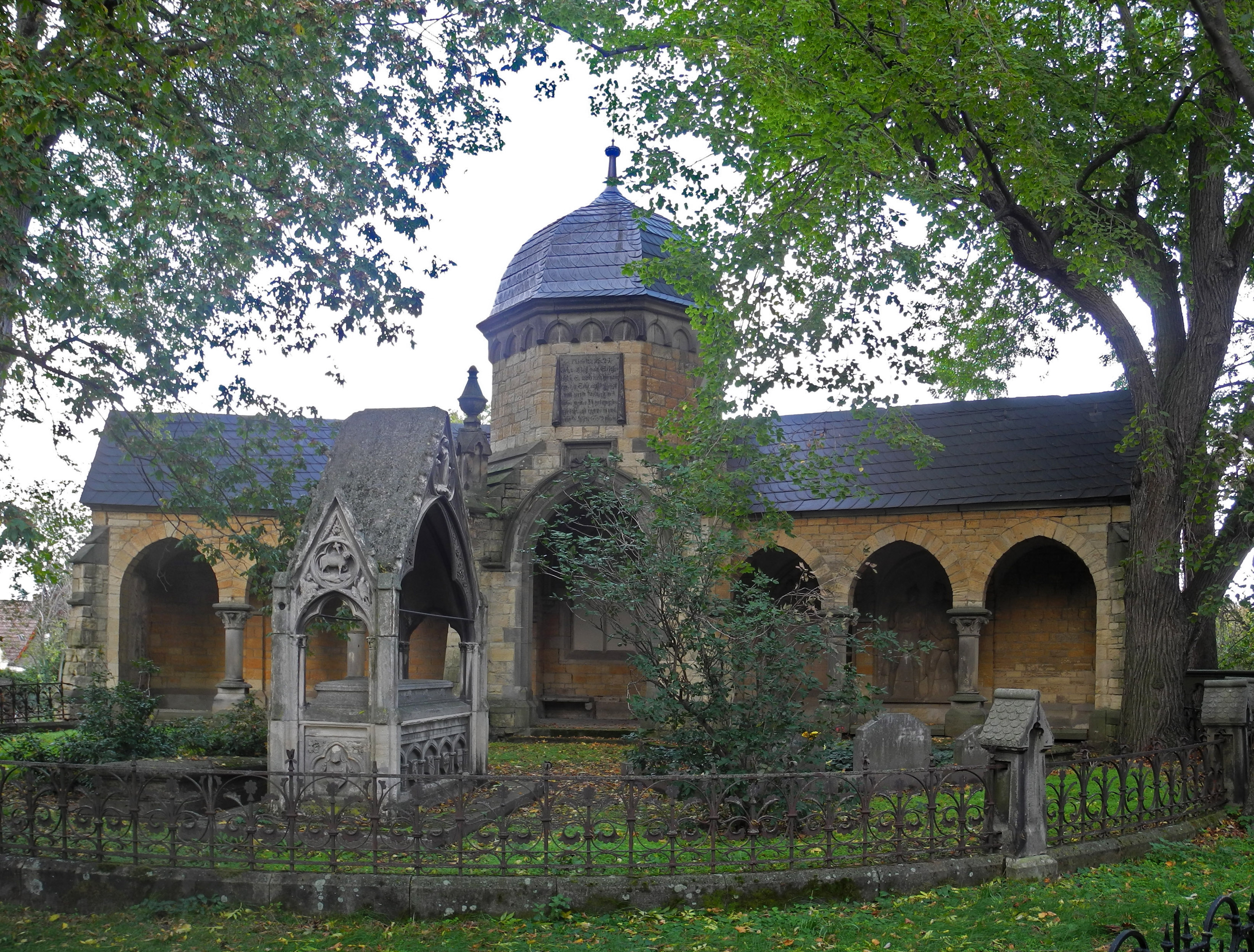 Grabmal der Familie von Alvensleben in Neugattersleben, Kirchhof